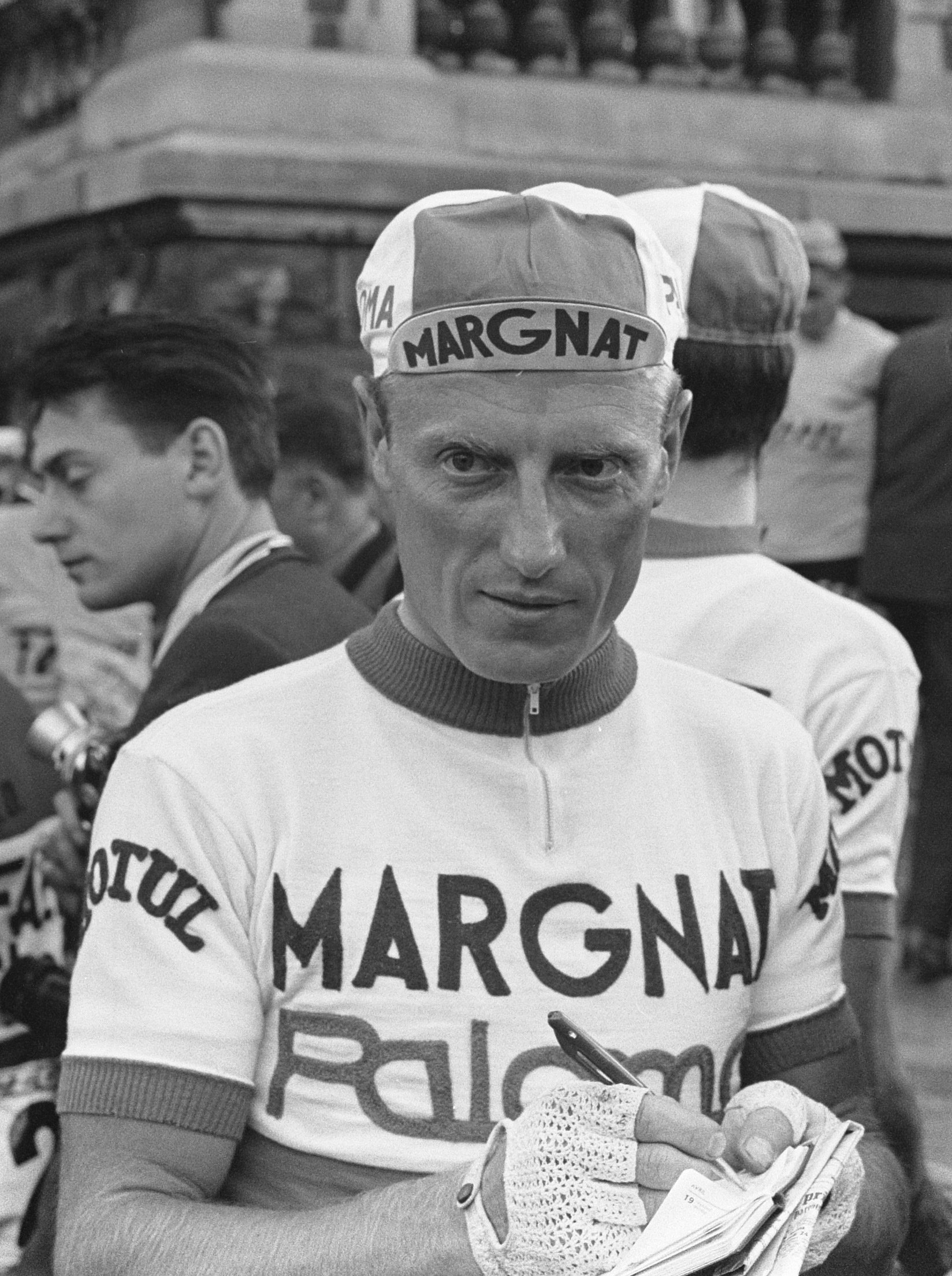 Tour de France bij de start. Darrigade geeft handtekening.